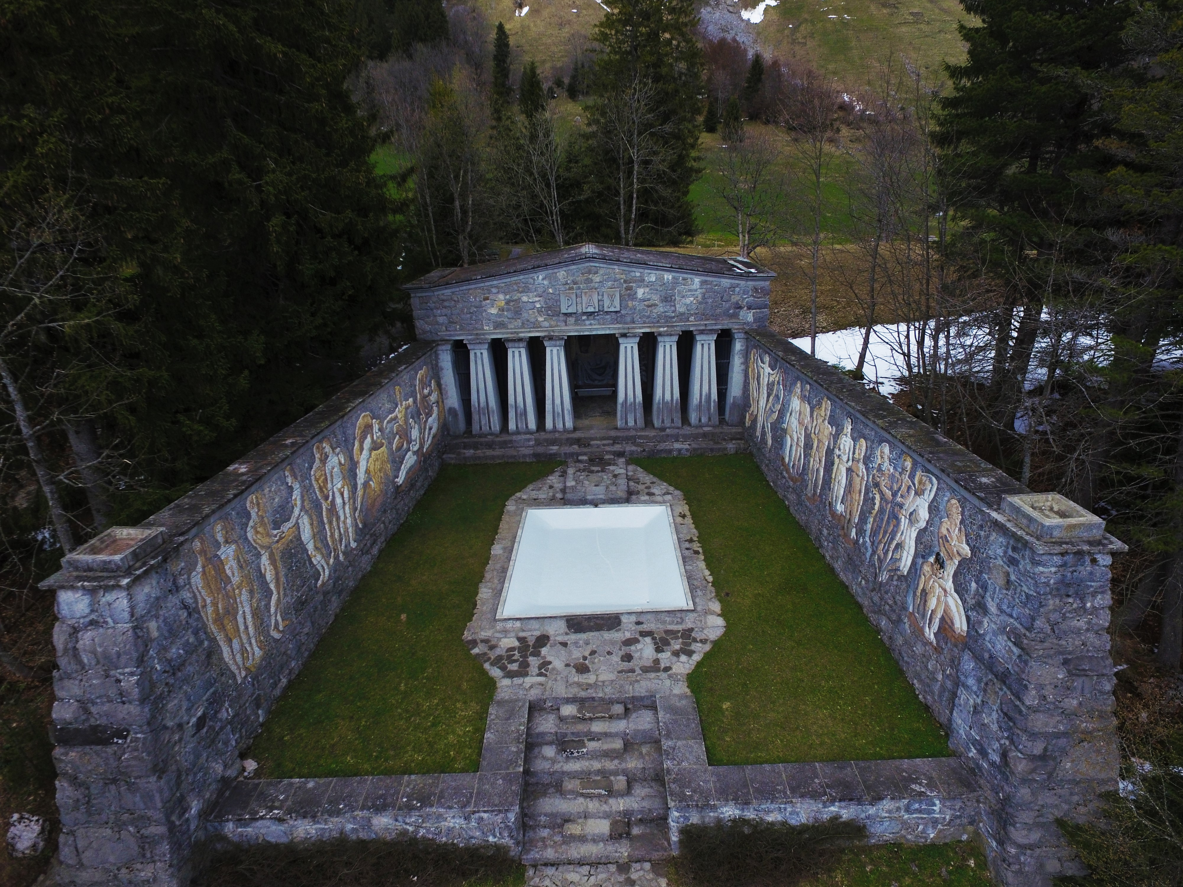 Aufnahme vom 30.04.16 mit einer Drohne